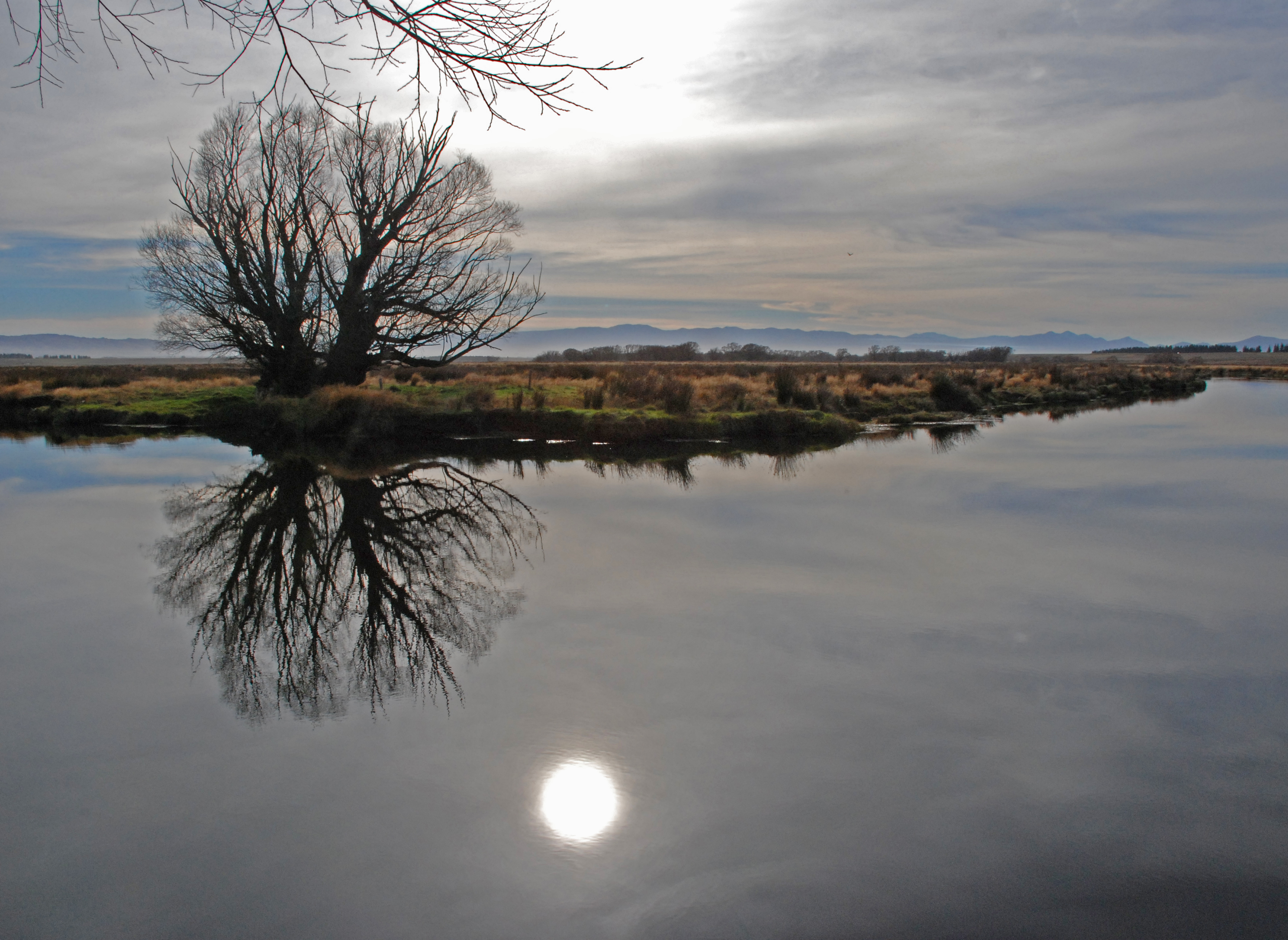 Taieri River at Claggans.